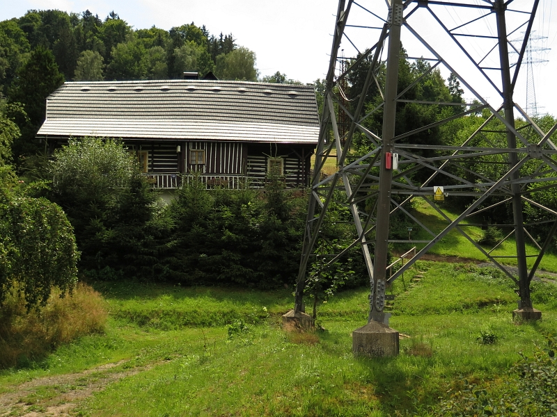 Usedlost čp. 43, Slaná 43, Slaná.